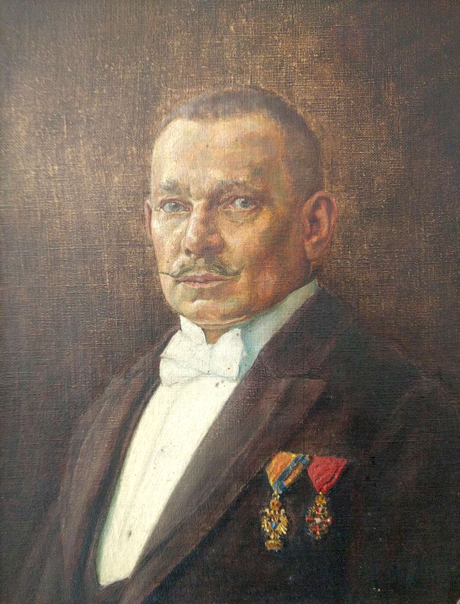 Portrait Josefa Vincence Nováka